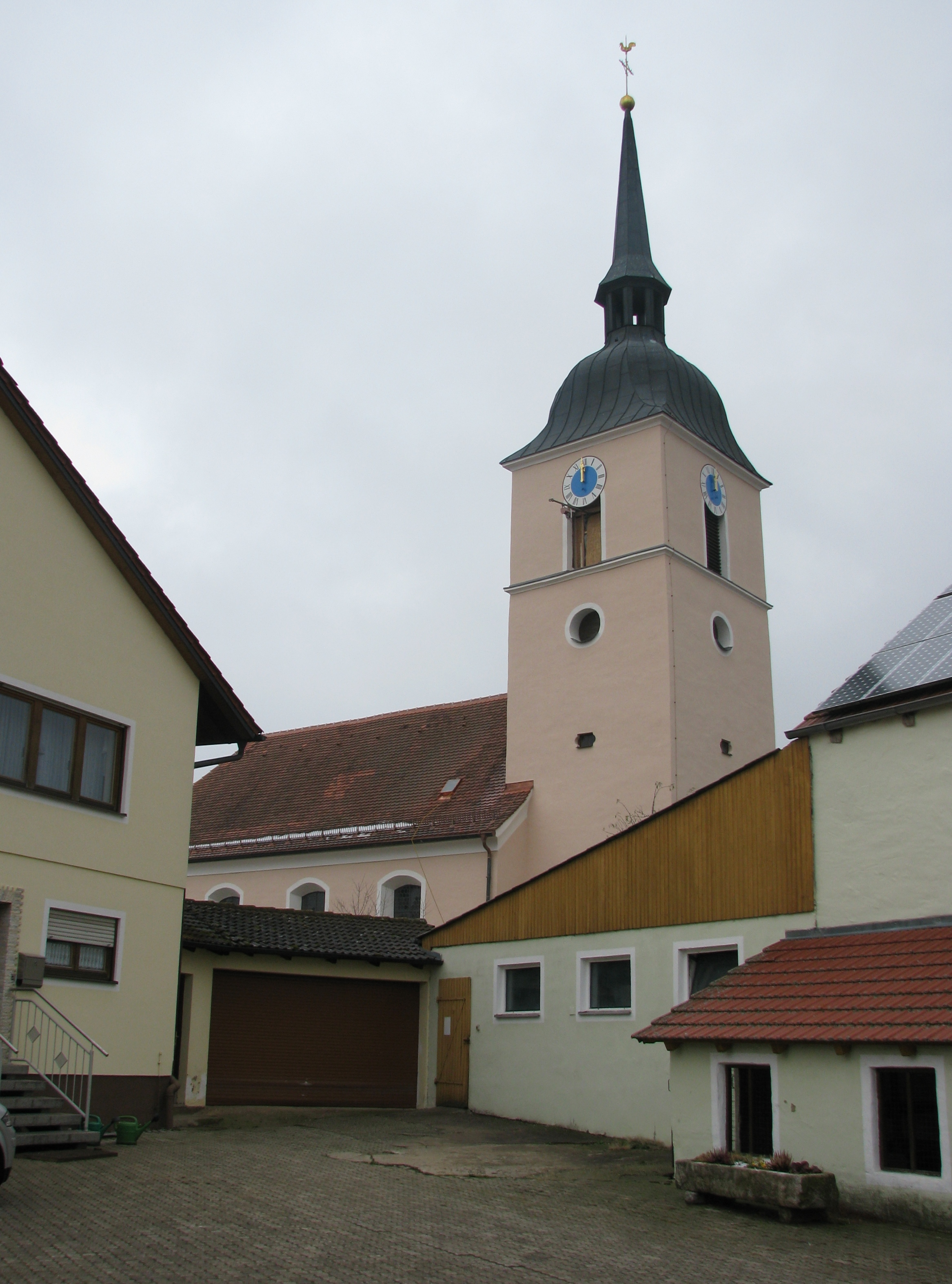 Kraftsbuch, Ortsteil von Greding im mittelfränkischen Landkreis Roth in Bayern, Katholische Filialkirche St. Andreas